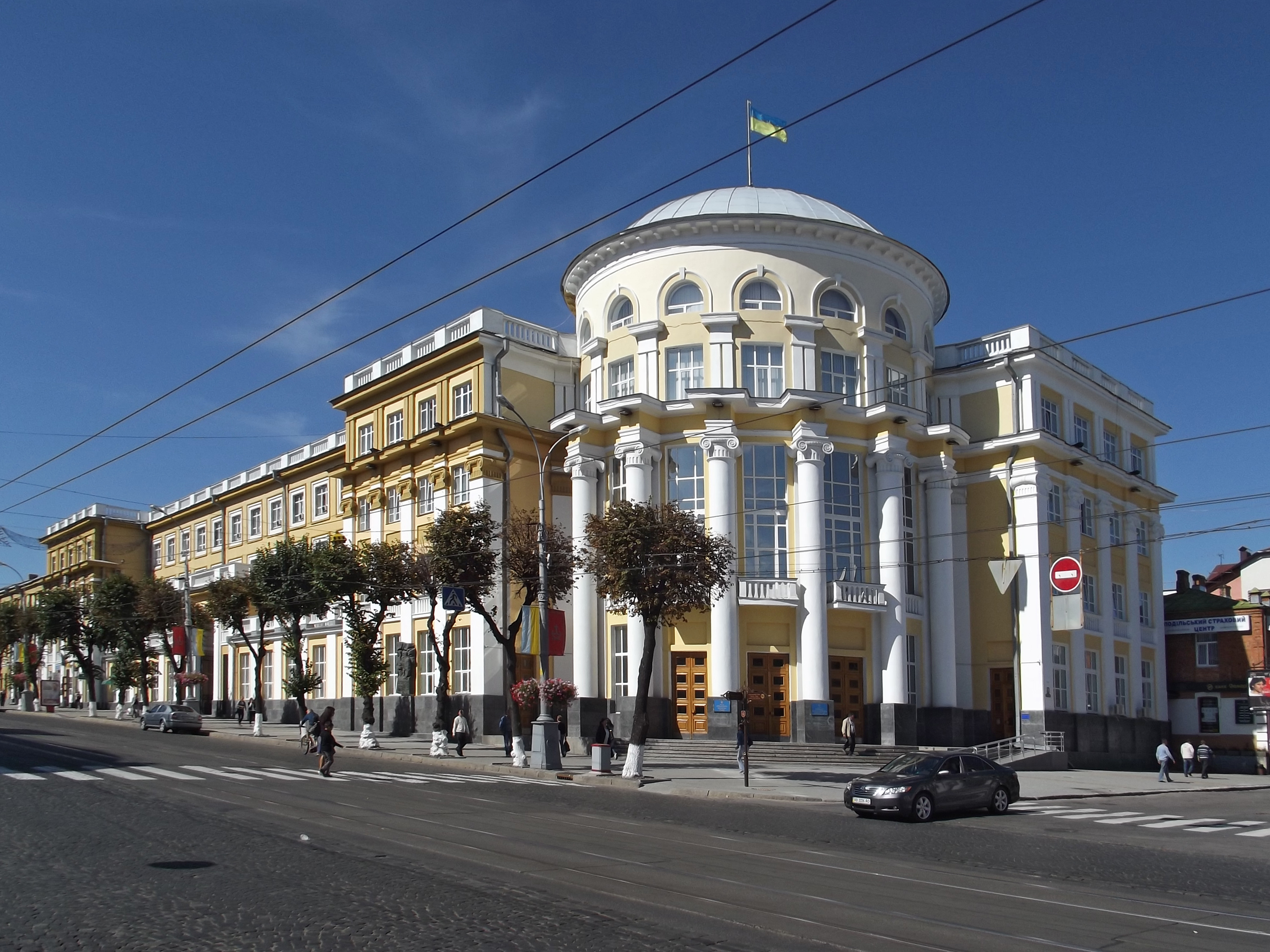 Здание Областной Рады